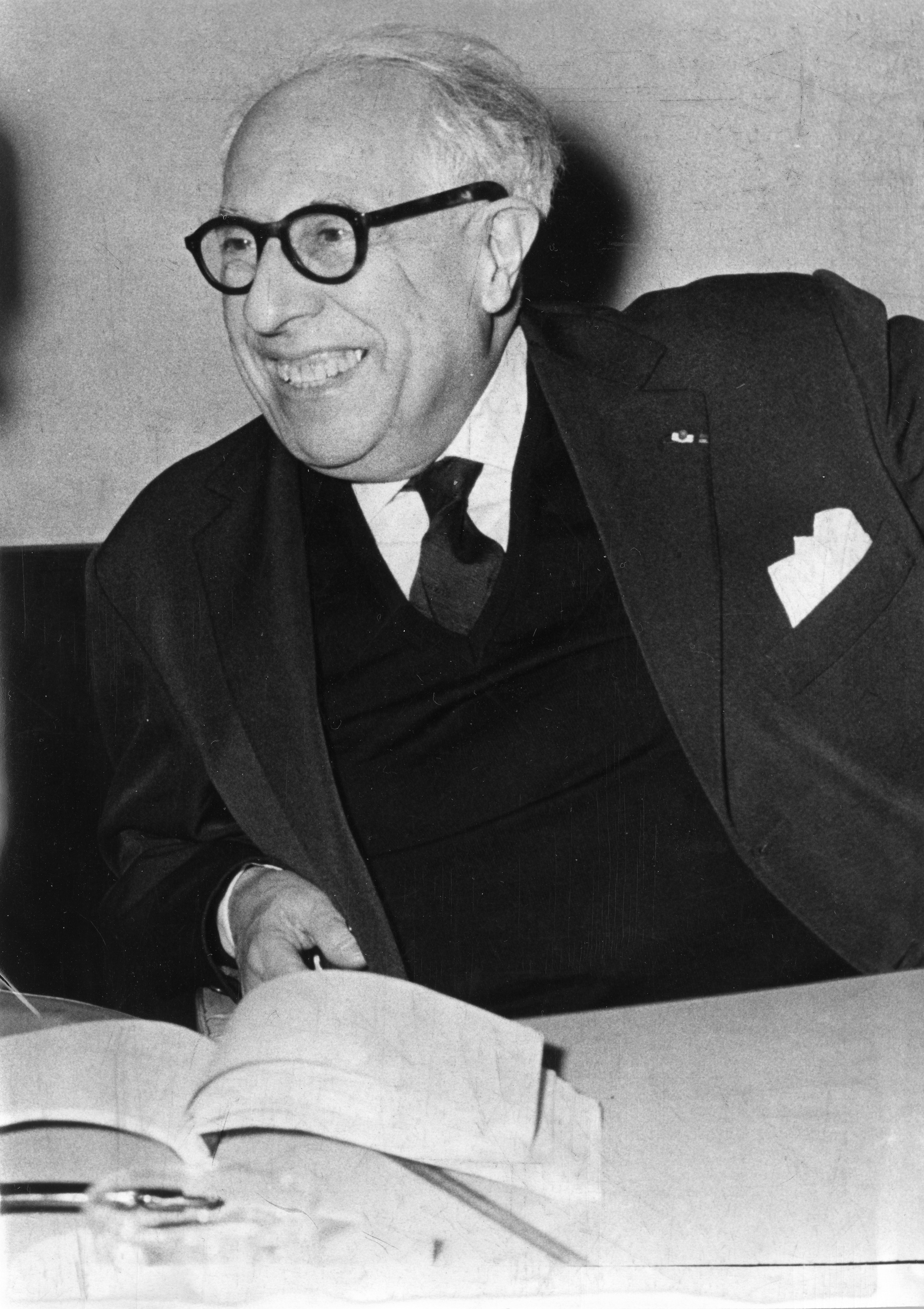 Francuski pisac Žan Kasu u Beogradu, 12. februara 1963.foto: Stevan Kragujević (po odobrenju kćerke Tanje Kragujević)